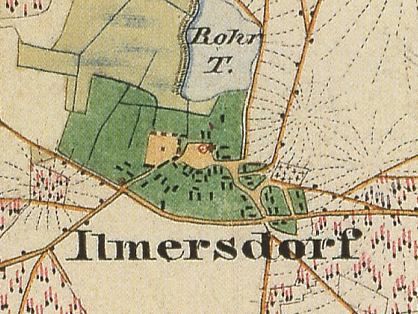 Illmersdorf, Gemeindeteil von Casel, Ortsteil der Stadt Drebkau, Landkreis Spree-Neiße, Brandenburg, Ausschnitt aus dem Urmesstischblatt 4351 Drebkau von 1846